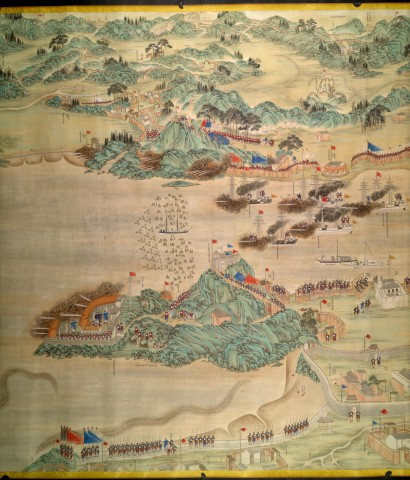 鎮海口海防佈置戰守情形圖